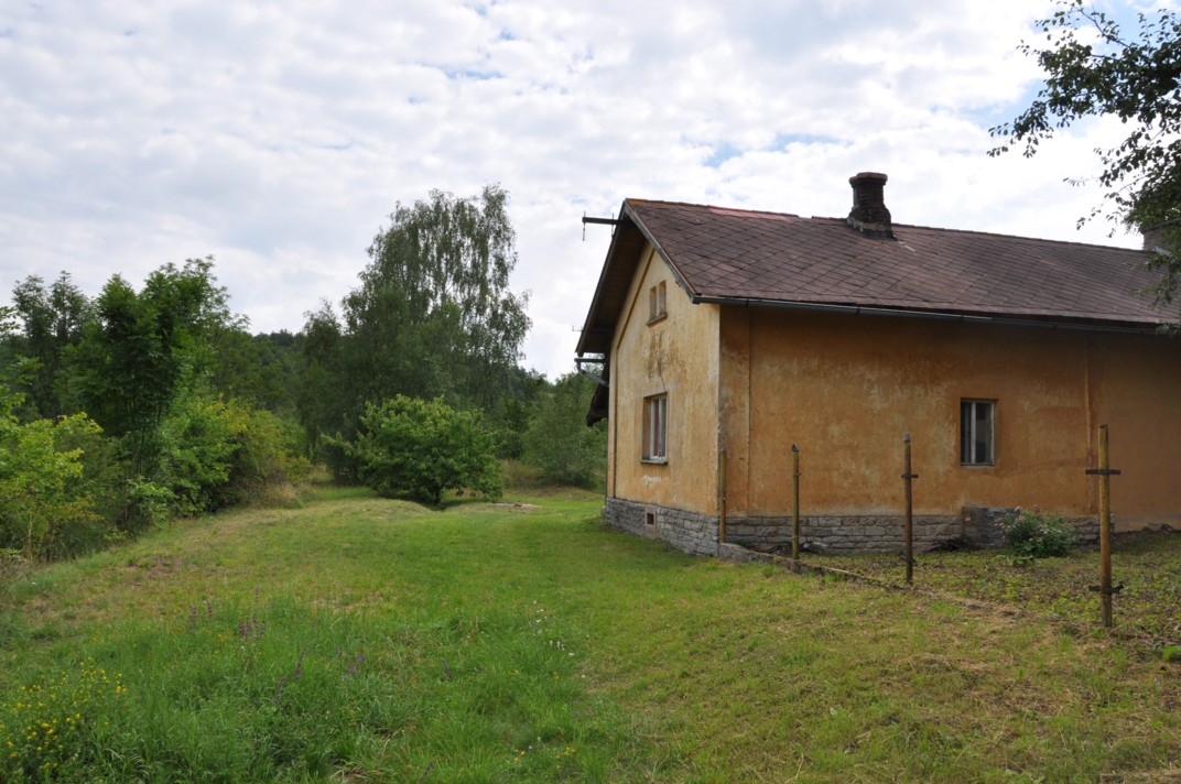 Ehemalige Station Koněprusy der Kleinbahn Königshof–Beraun–Koněprus